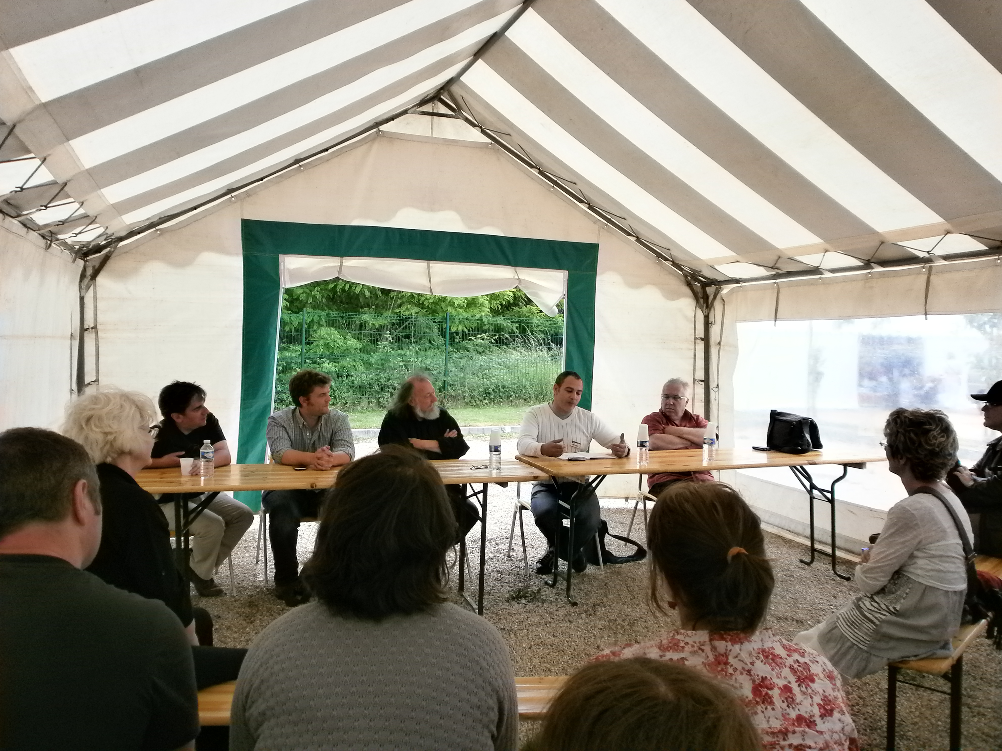 La Table Ronde du festival Les Féeries du Bocage à Voulx, avec de gauche à droite : Hervé Gourdet, Godo, Pierre Dubois, Ramzy et Pascal Lamour